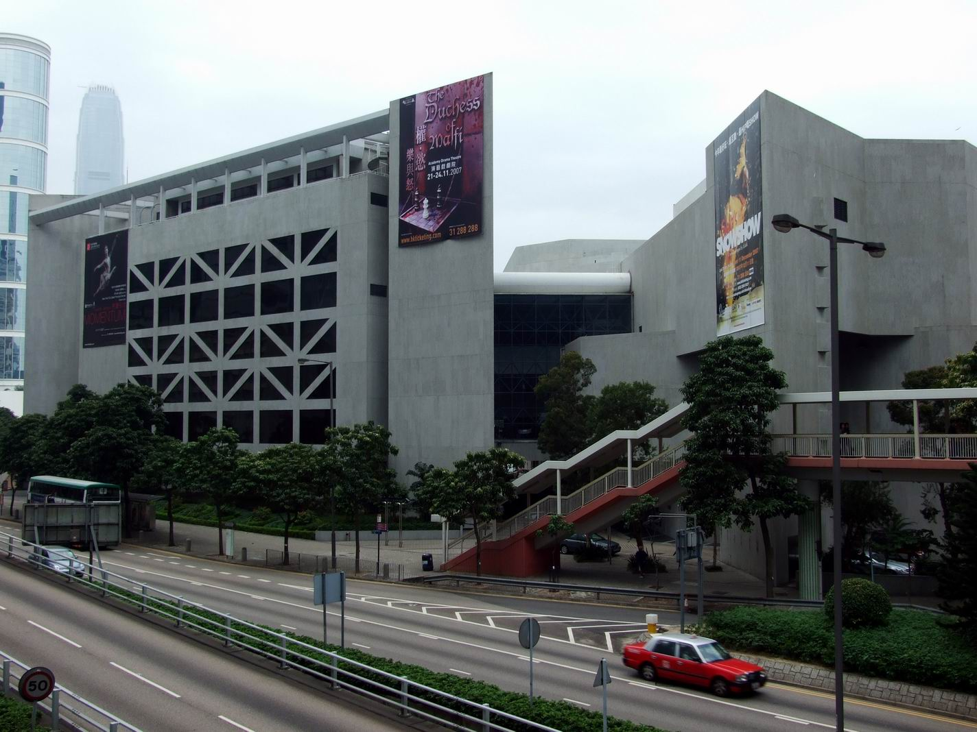 香港演藝學院